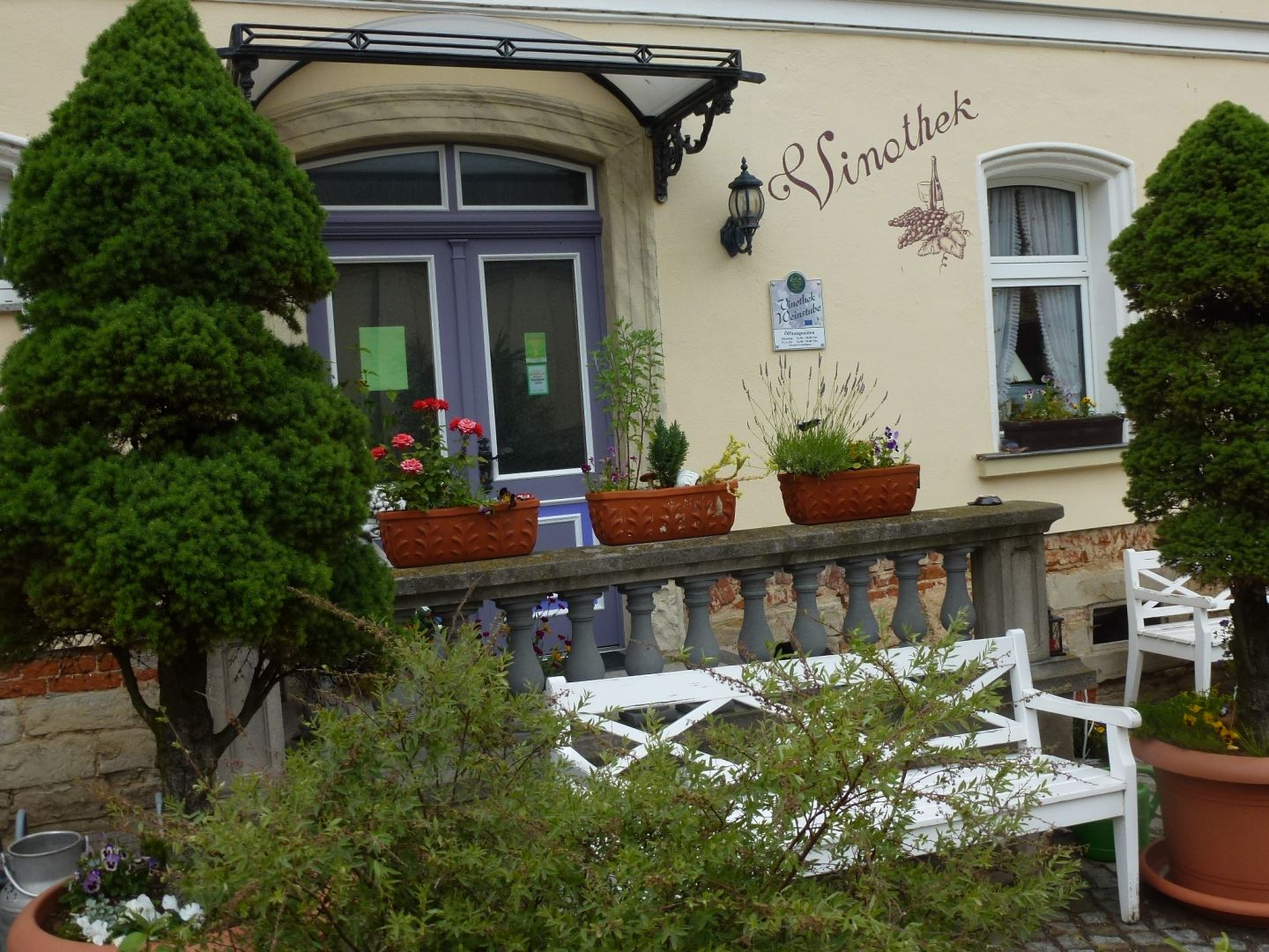 Eingang zur Vinothek in Würchwitz